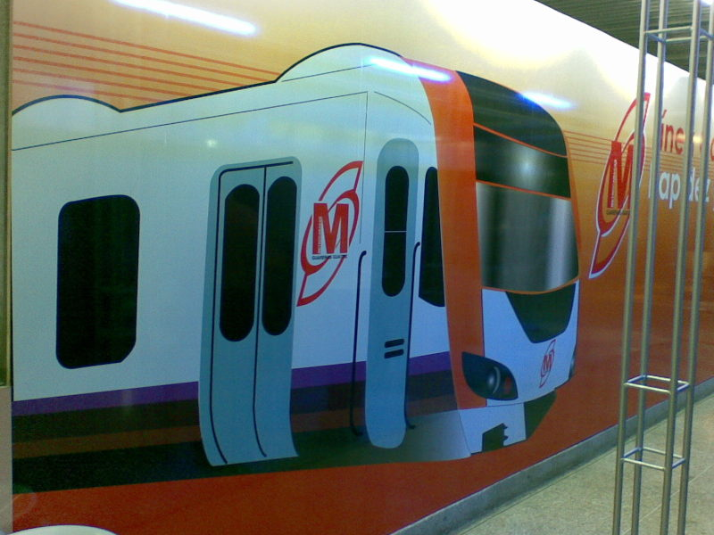 Vista de los trenes propuestos para el Metro de Guarenas-Guatire, Estado Miranda, Venezuela